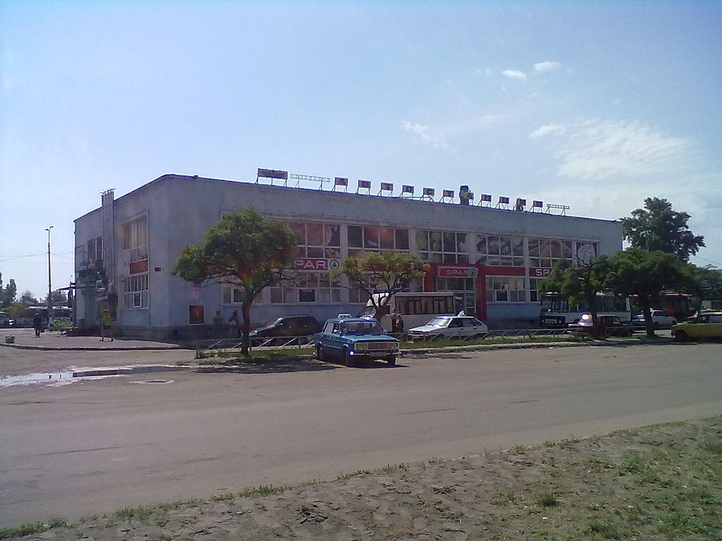 автовокзал